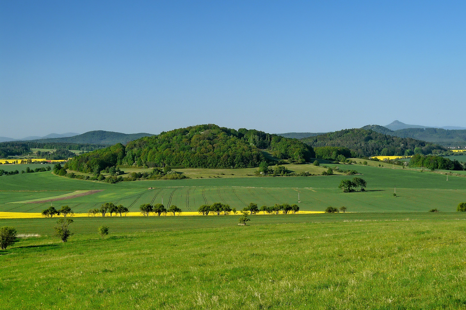 Zbynský vrch z úpatí Koreckého vrchu, vlevo Dub, vpravo Skalka, Borný, Ralsko